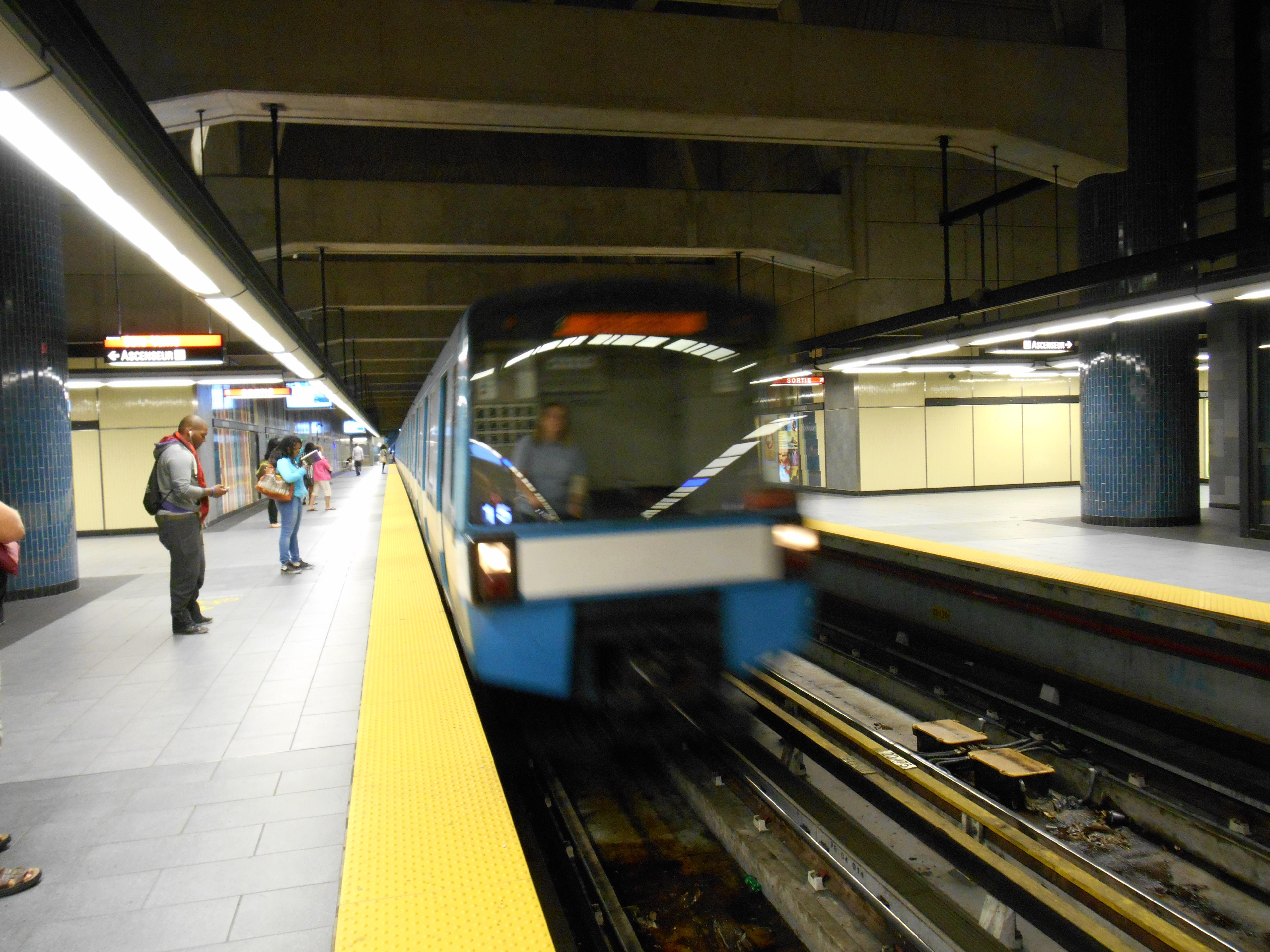 Station de métro Montmorency à Laval